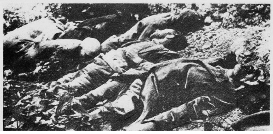 20 mai 1940 - Massacre d'Abbeville - Les corps de Jan Rijckoort, Joris Van Severen, Lucien Monami, René Wéry (chauve), et de deux italiens